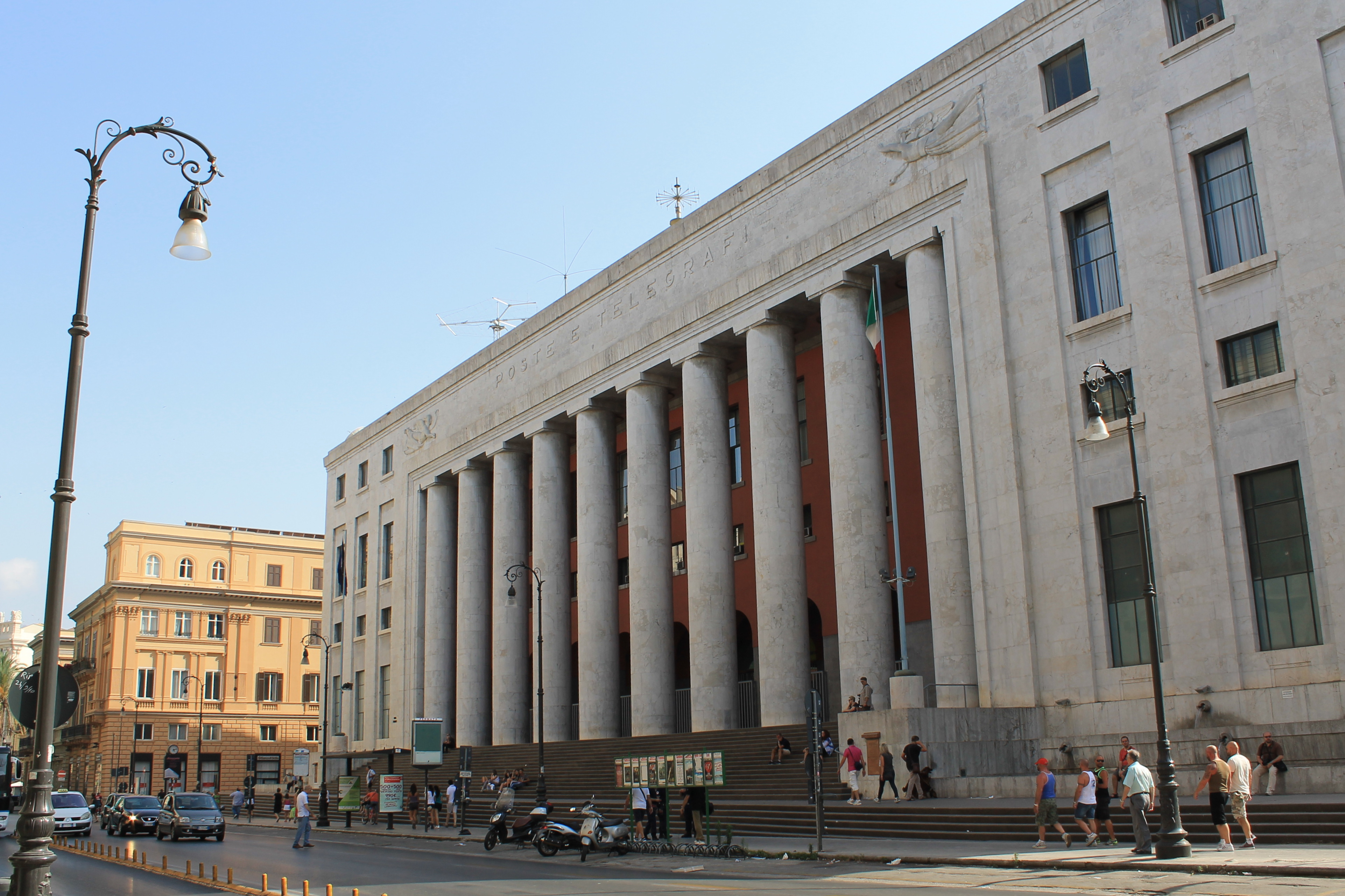 Palazzo delle Poste, Palermo, Italia.